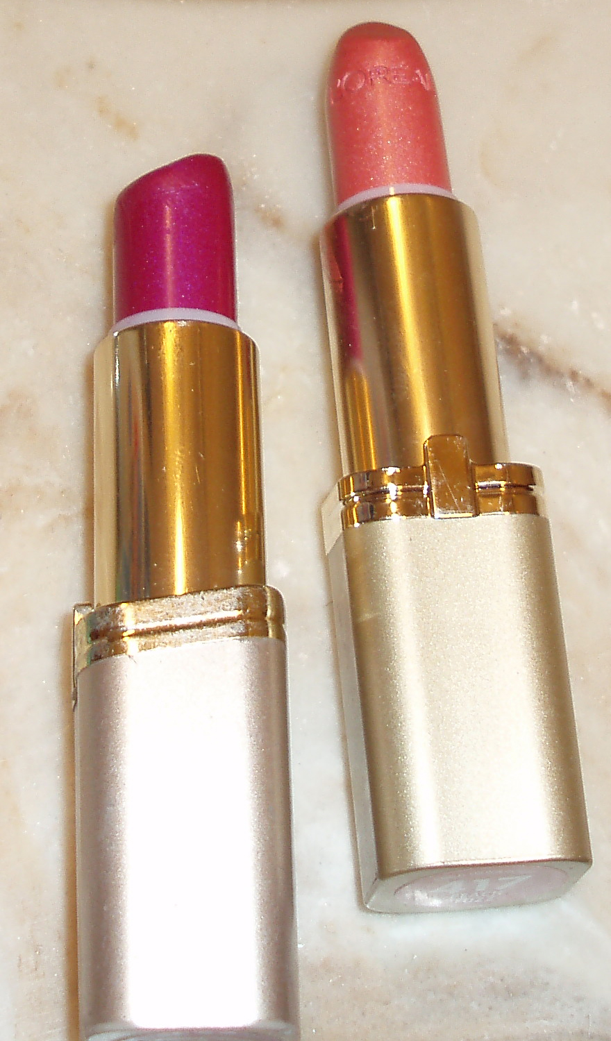 Sea Fleur (630) and Peach Fuzz (417)